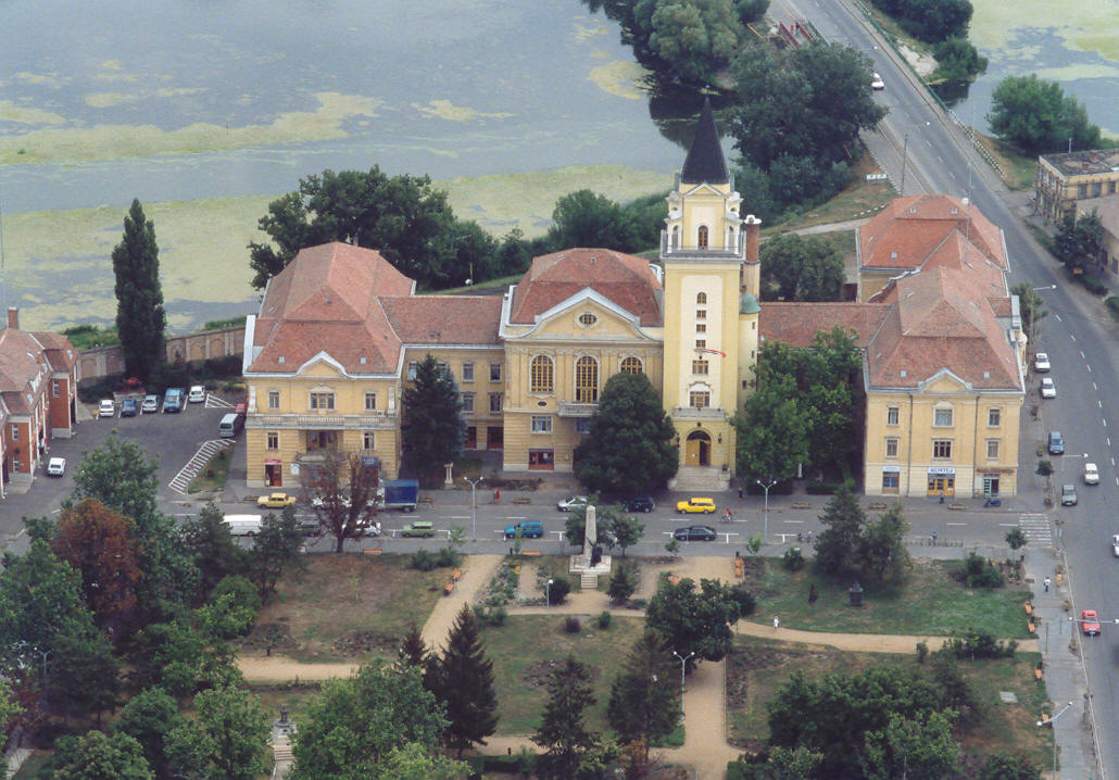 Városháza - Mezőtúr - Hungary - Europe